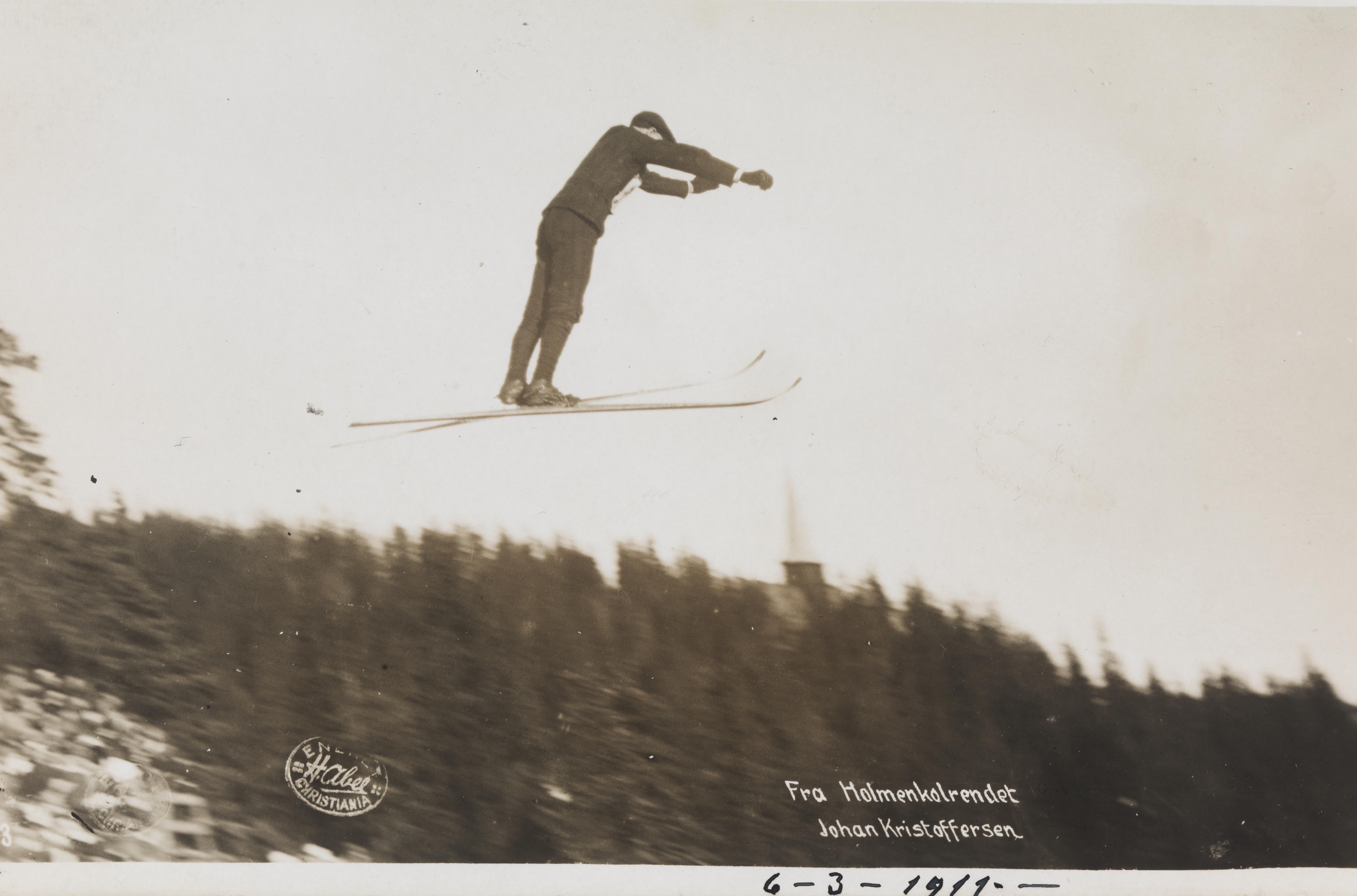 Bildet er hentet fra Nasjonalbibliotekets bildesamling Holmenkollbakken,Holmenkollen, Oslo, Oslo Depicted person: Kristoffersen, Johan